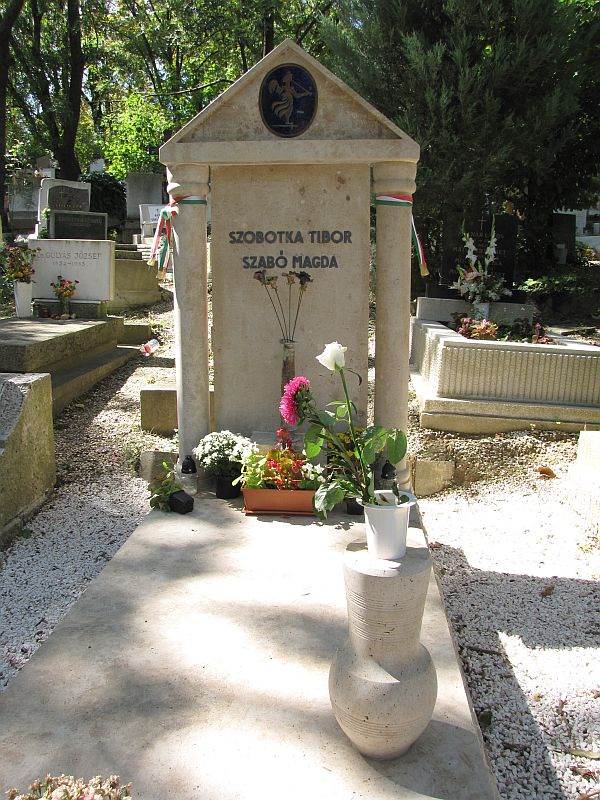 Szabó Magda (Debrecen, 1917. október 5. – Kerepes[1], 2007. november 19.) írónő, műfordító és Szobotka Tibor (Bp., 1913. márc. 19. – 1982. febr. 26.) író, műfordító, irodalomtörténész sírja Budapesten. Farkasréti temető: 21/1-1-13.